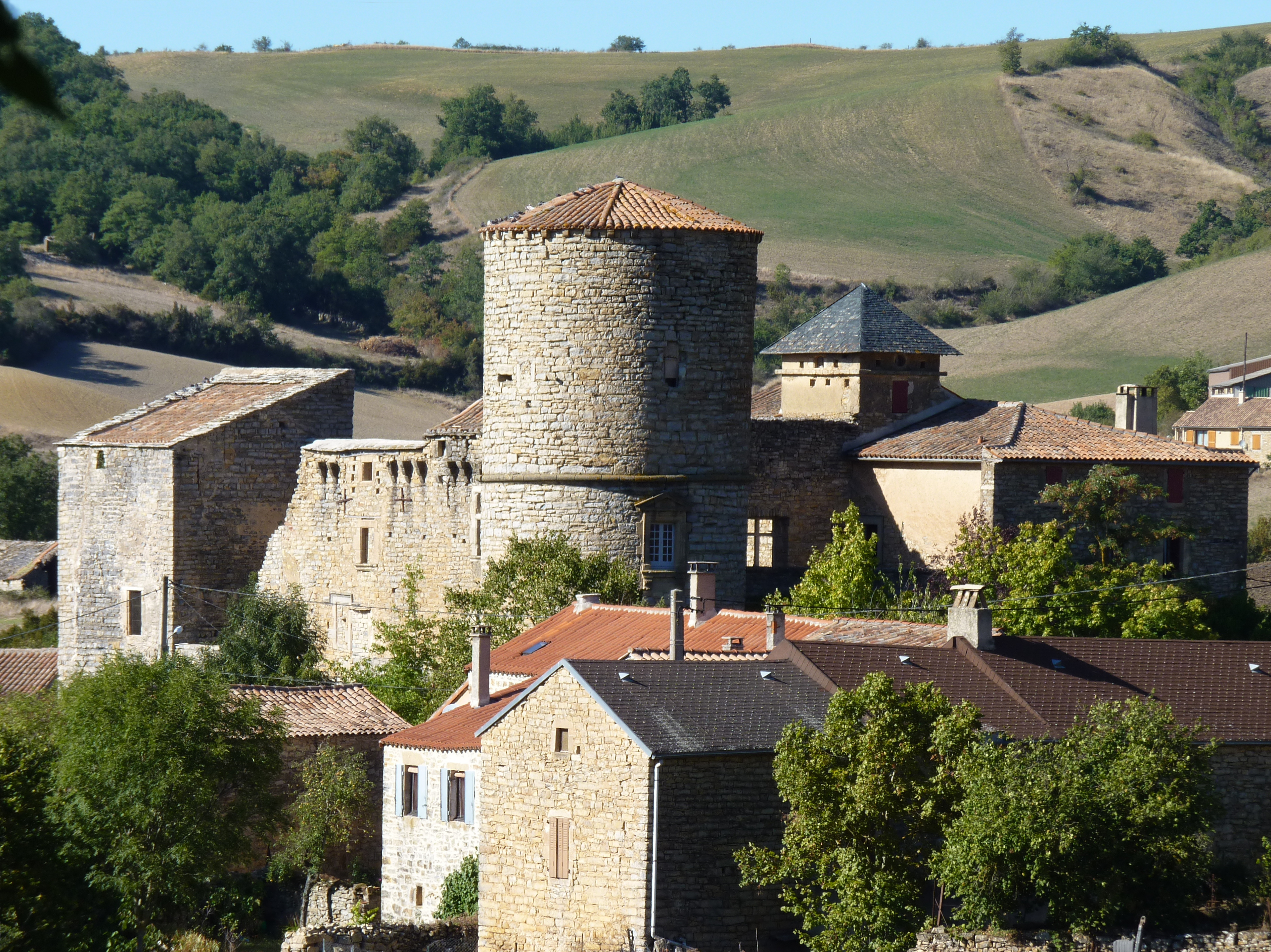 Château de Mélac, Aveyron, France .